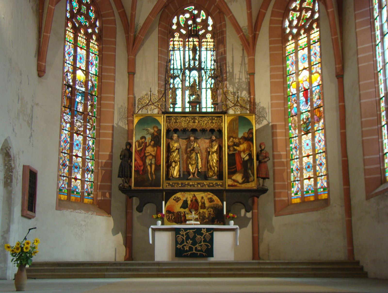 Stadtkirche St. Johannis (Neustadt an der Orla), Cranach-Altar